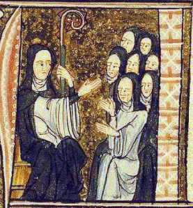 Hildegard von Bingen and her nuns